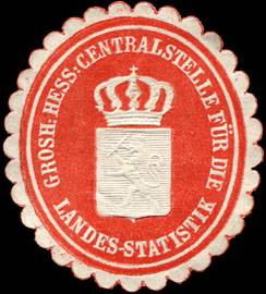 Sealing stamp Title: Grossherzoglich Hessische Centralstelle für die Landes - Statistik Description: rot, weiß, geprägt Place: Darmstadt size: 3x3 cm